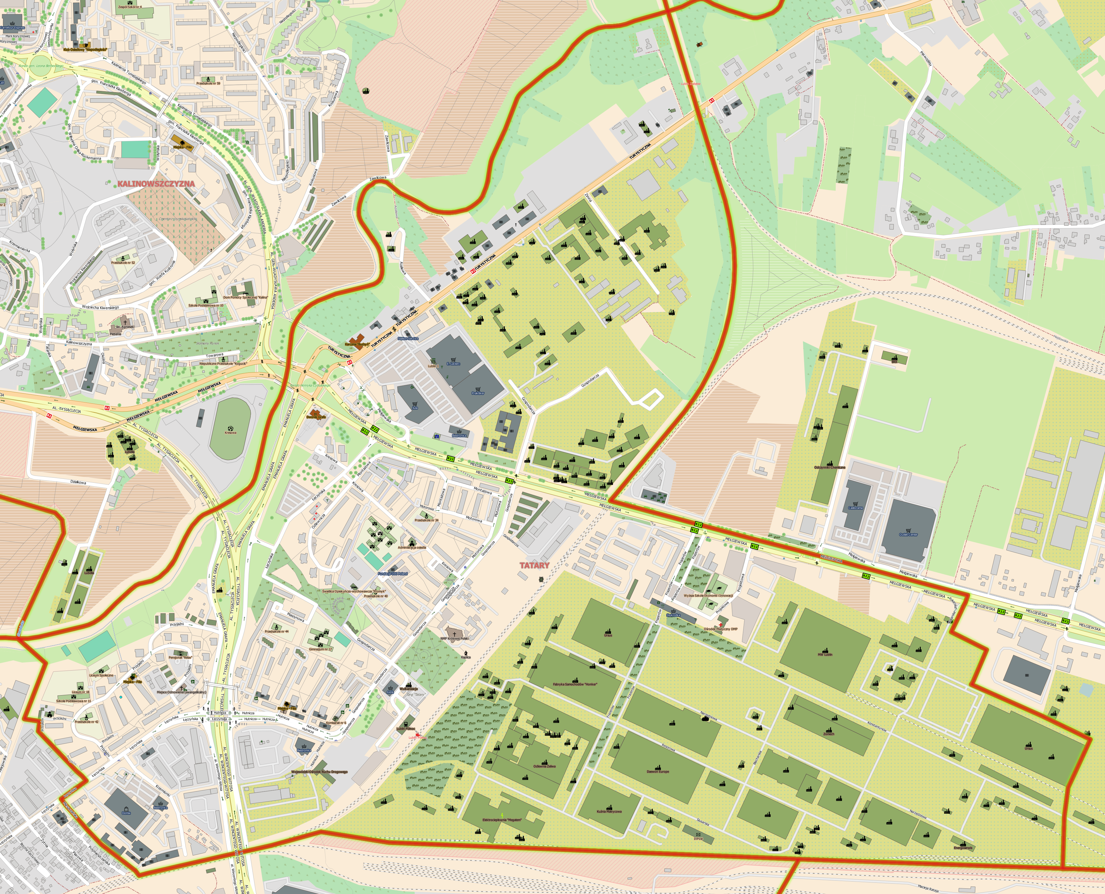 Plan dzielnicy Tatary w Lublinie.